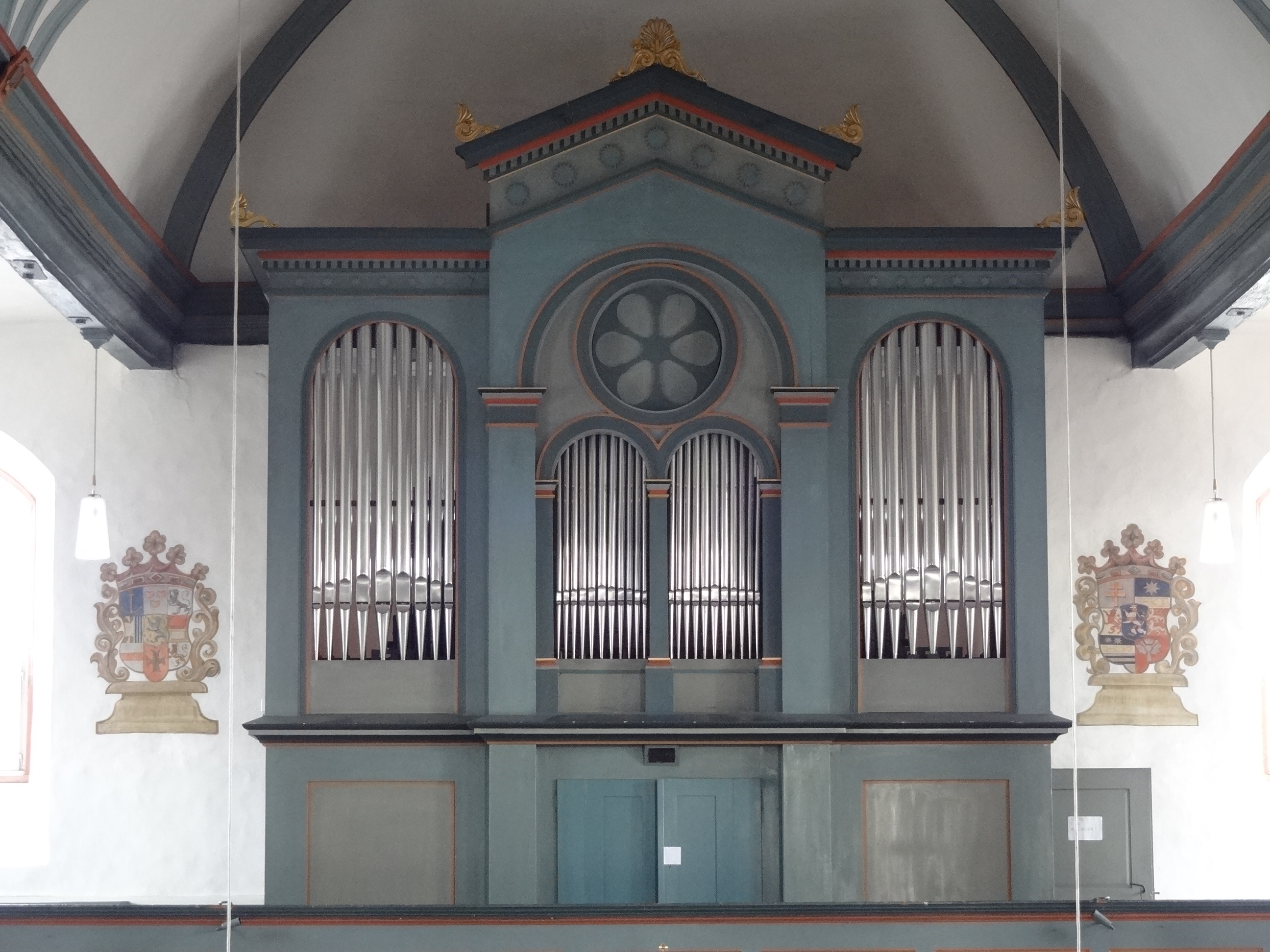 Evangelische Pfarrkirche (Gambach)